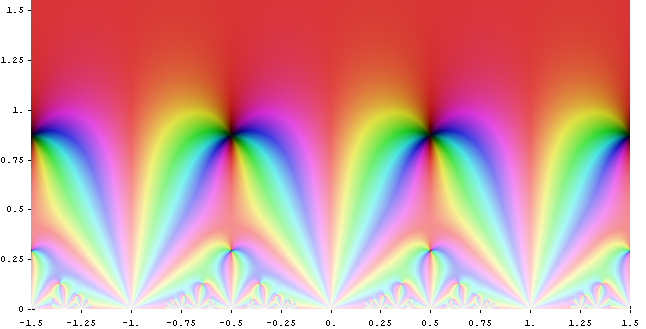 Eisenstein series G_8